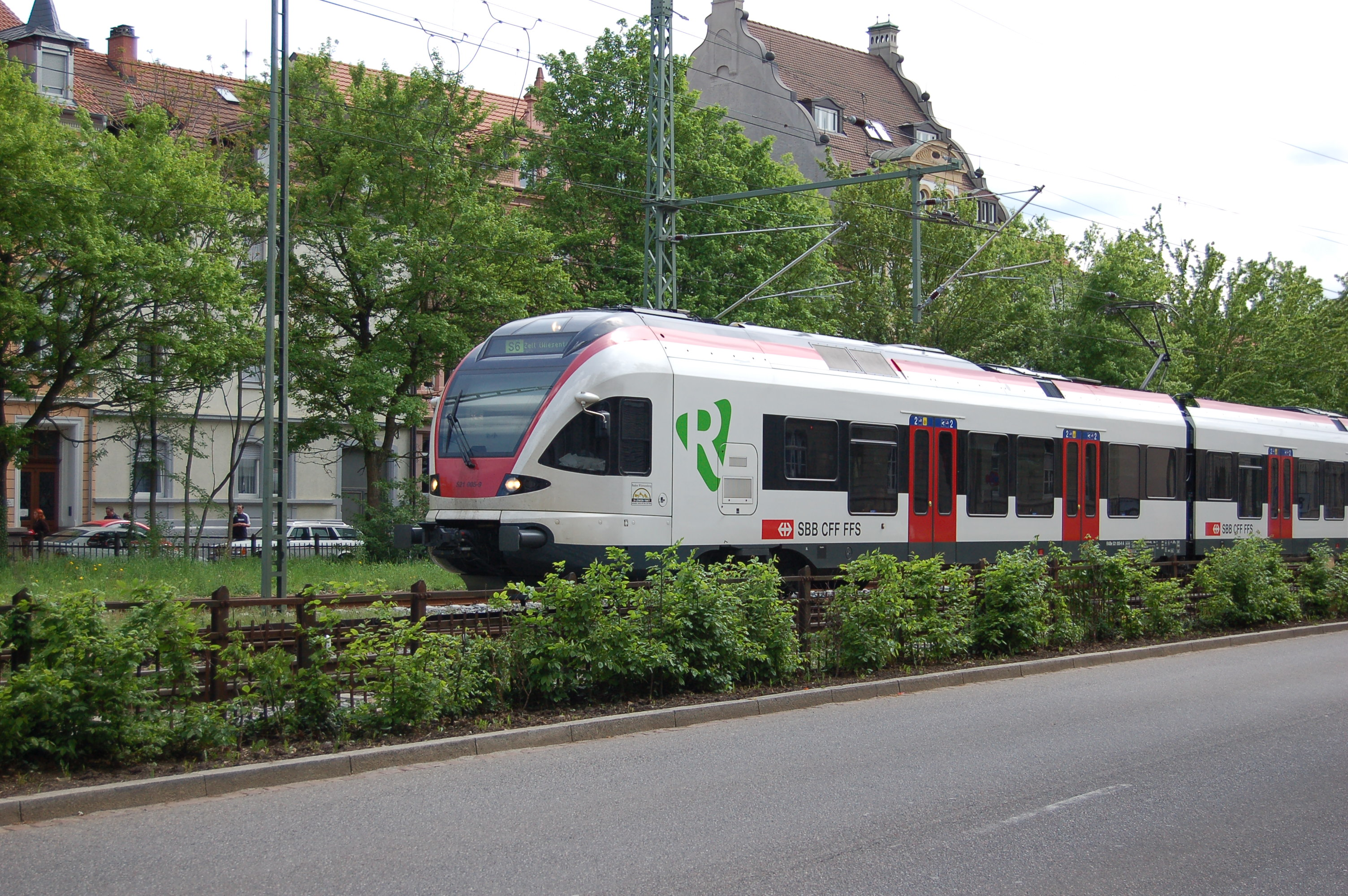 Zug der Regio S-Bahn bei der Einfahrt in den Lörracher Hauptbahnhof.